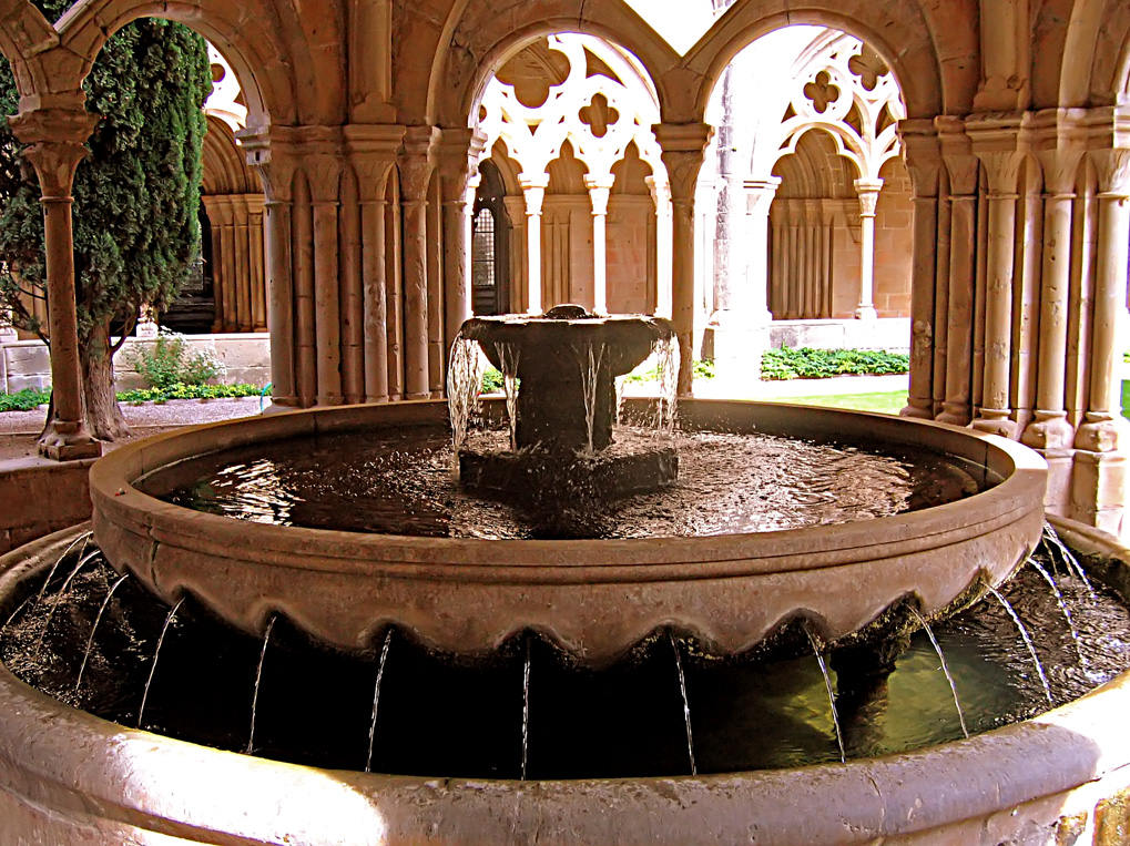 La fuente del monasterio de Poblet. Tarragona (Spain)